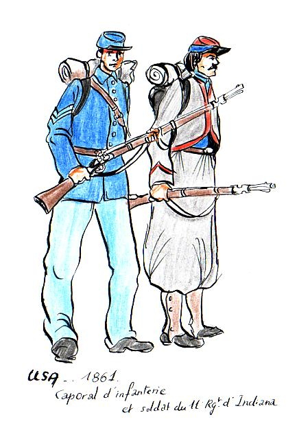 dessin personnel de Jp.negre